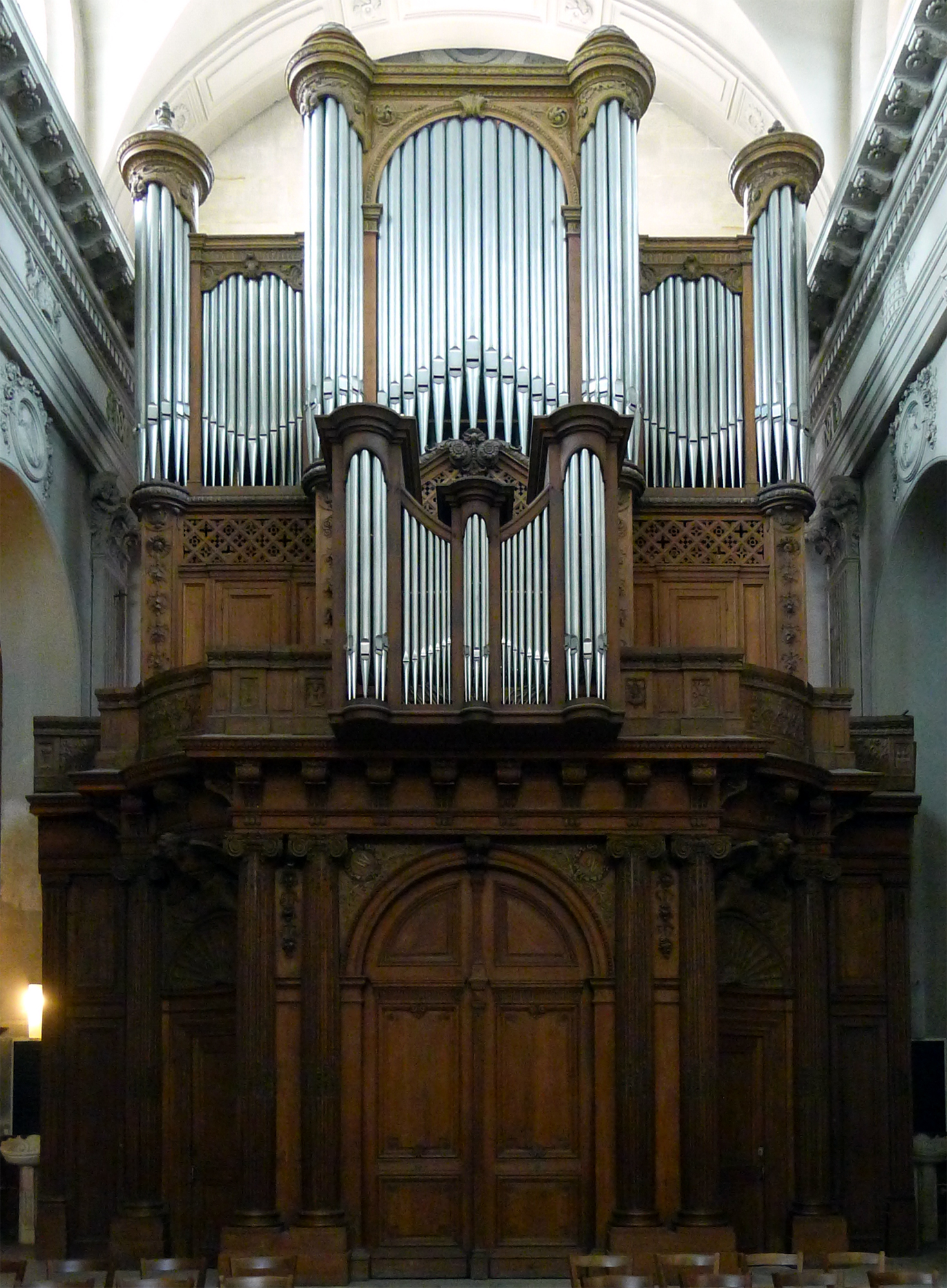 Église Notre-Dame-des-Blancs-Manteaux (orgue de tribune) - Paris IV . PM75000898 buffet.